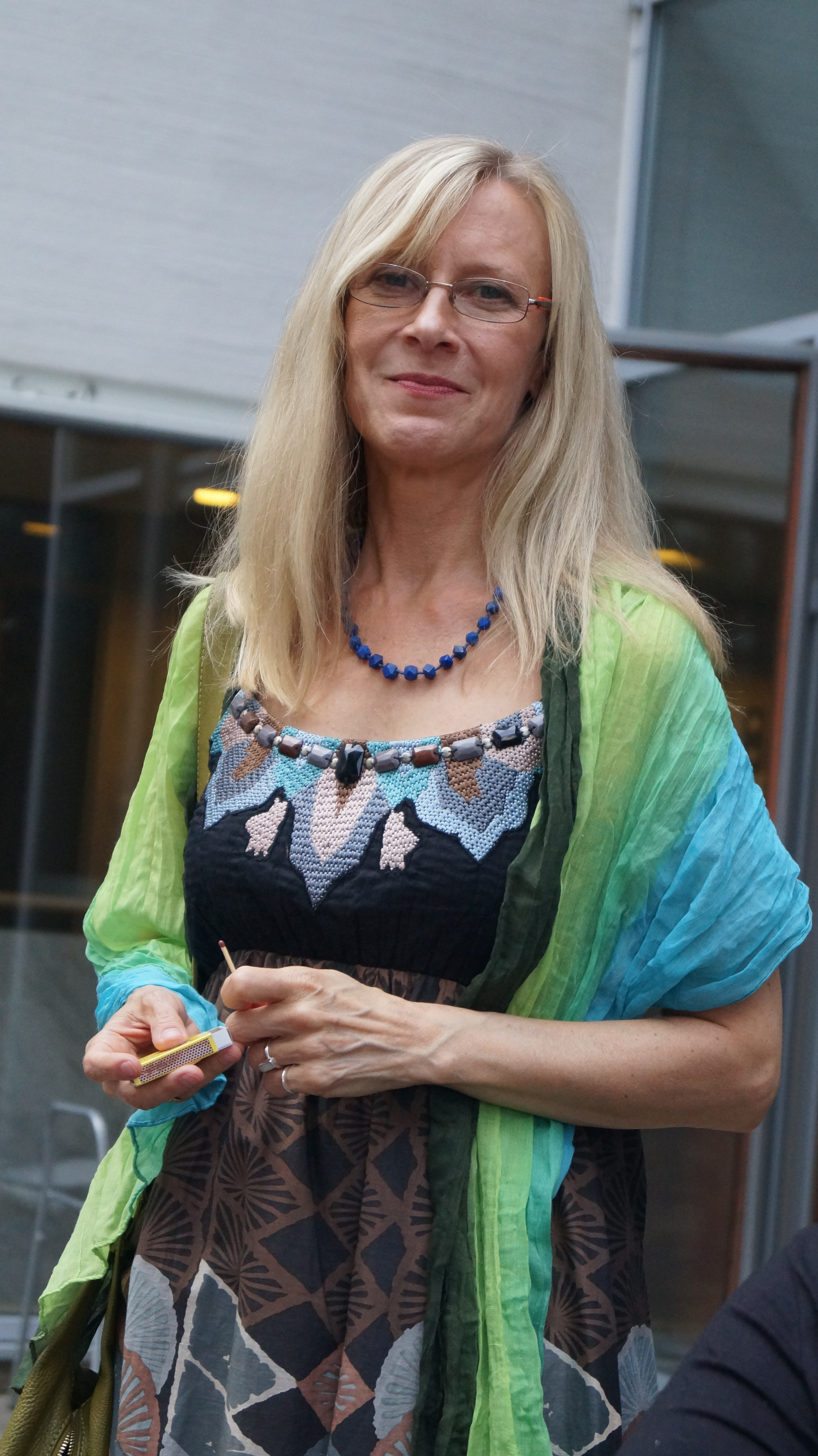 Helka-Maria Kinnunen Kajaanin runoviikolla 2013